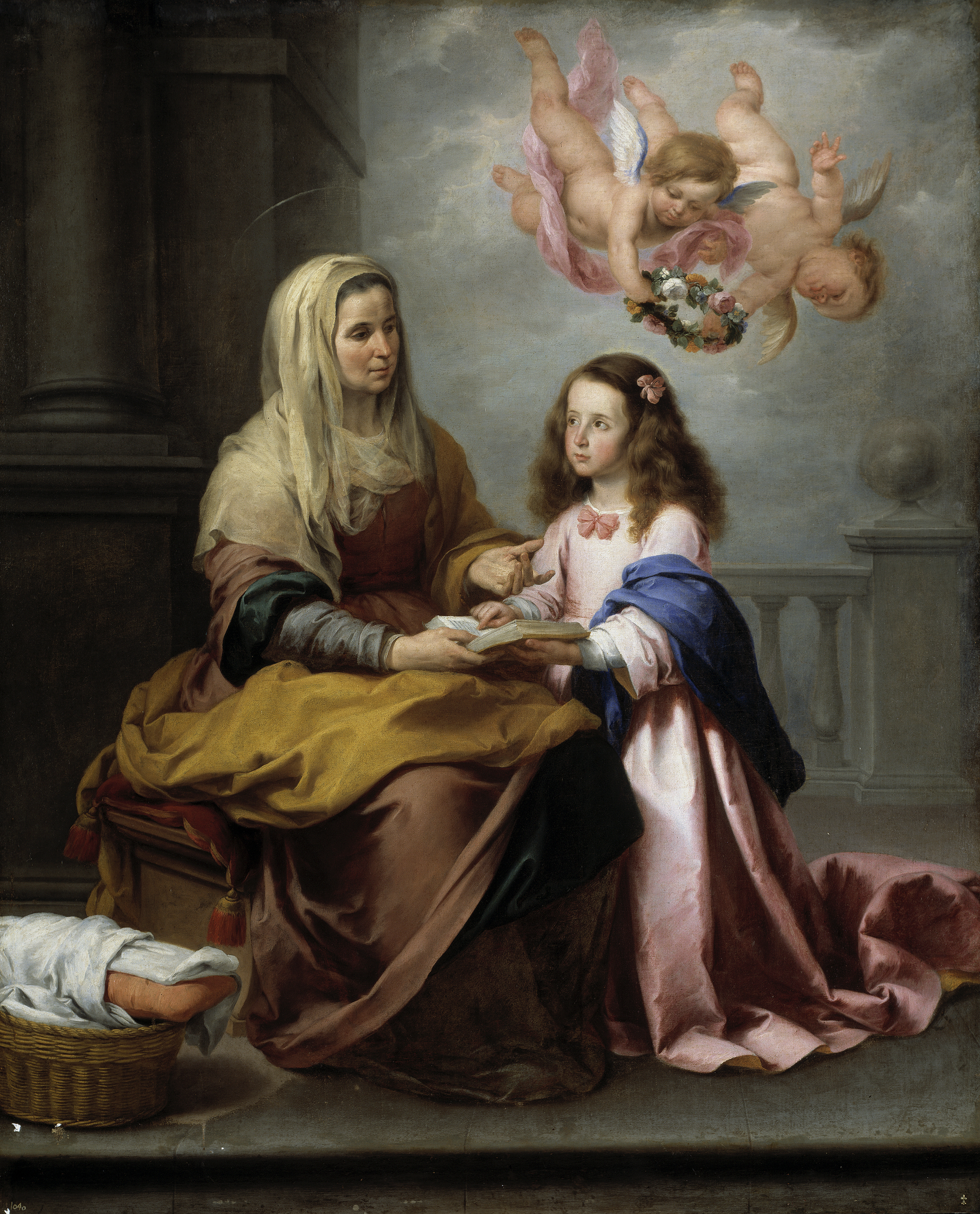 La obra representa a Santa Ana enseñando a leer a su hija, la Virgen María.